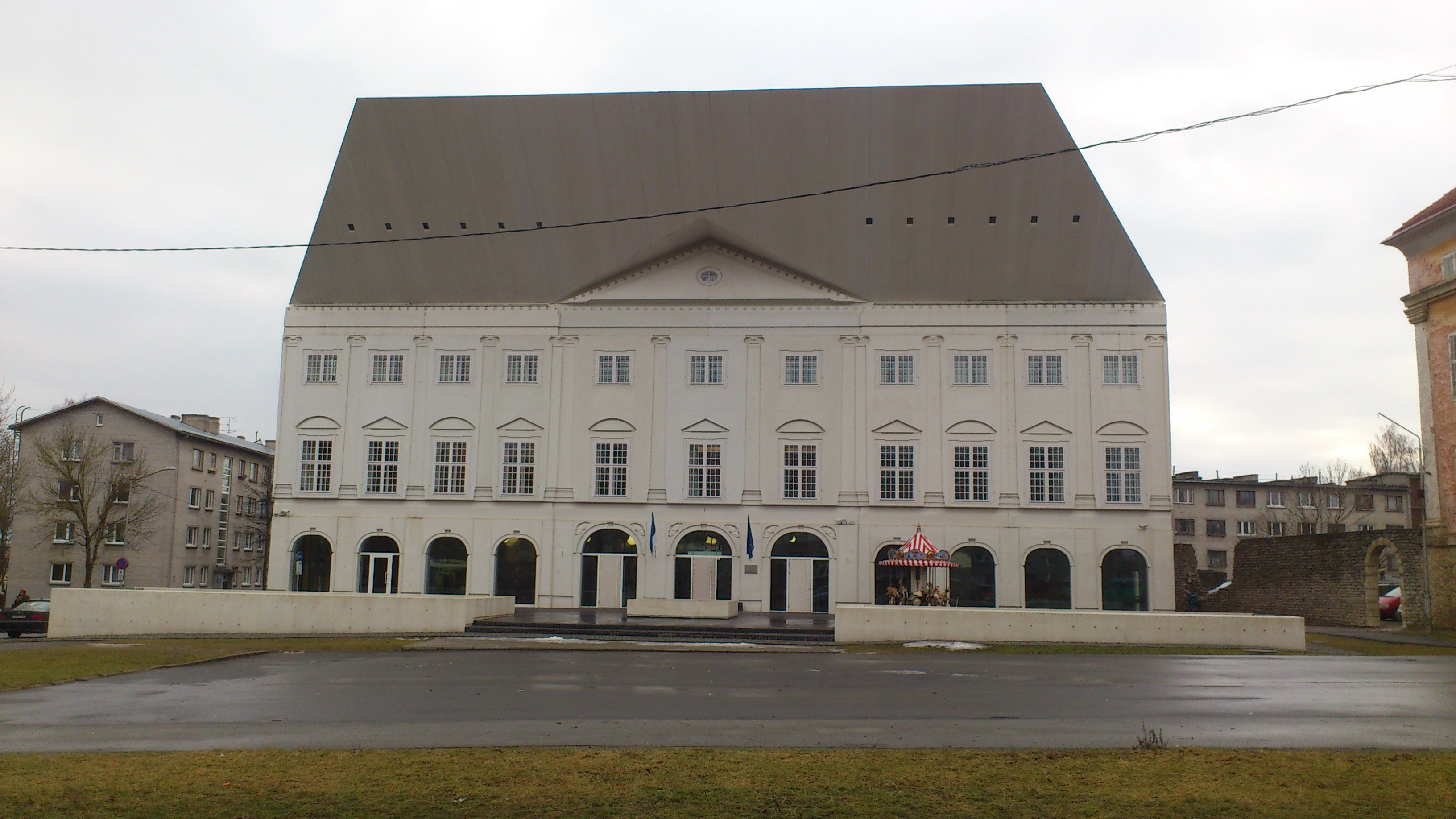 Tartu Ülikooli Narva kolledži uus hoone